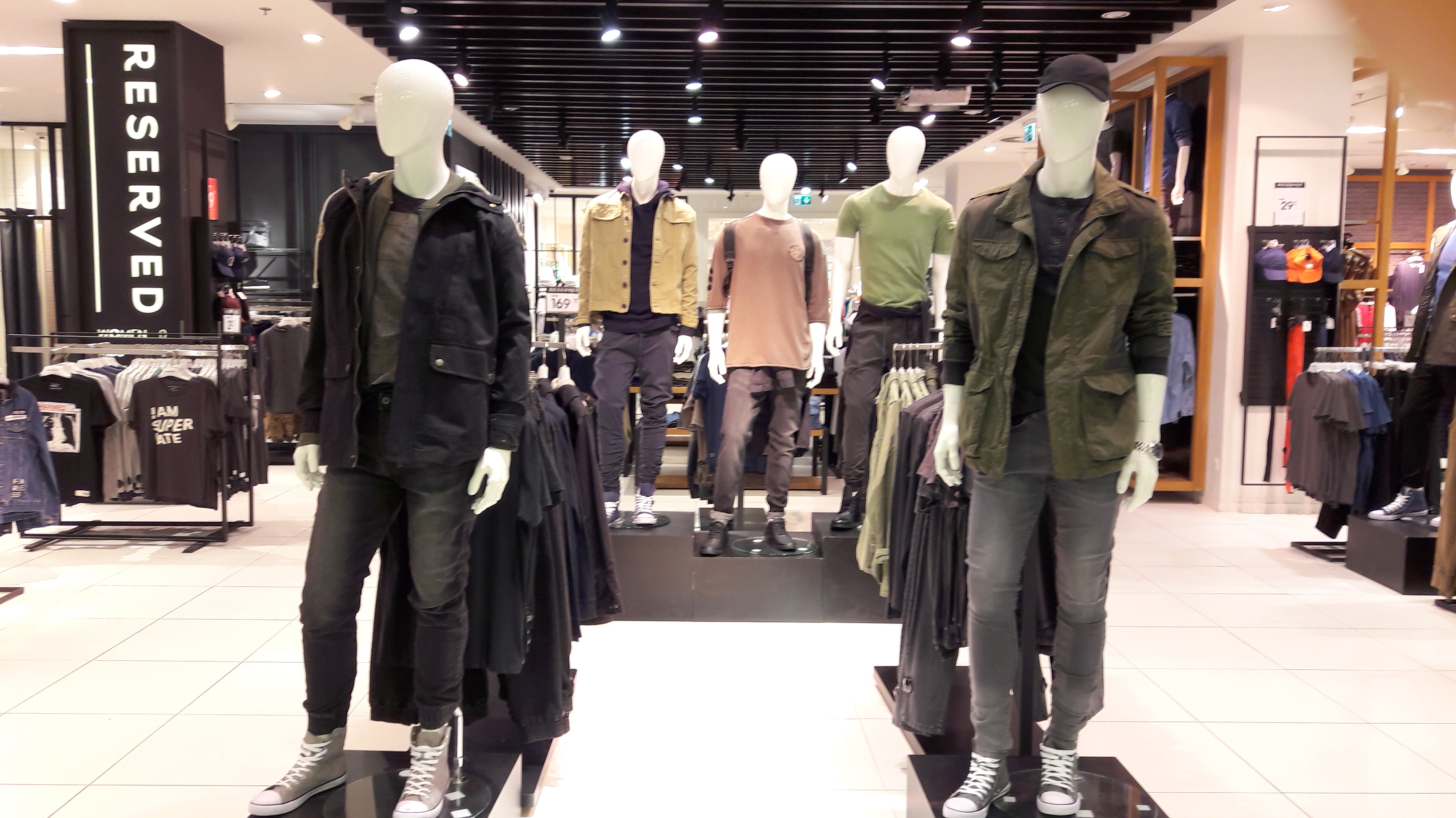 LPP (Unternehmen)